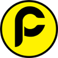 パックコイン（英：PACcoin）のロゴ